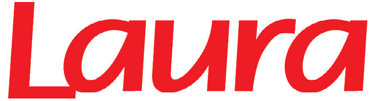 Laura Logo